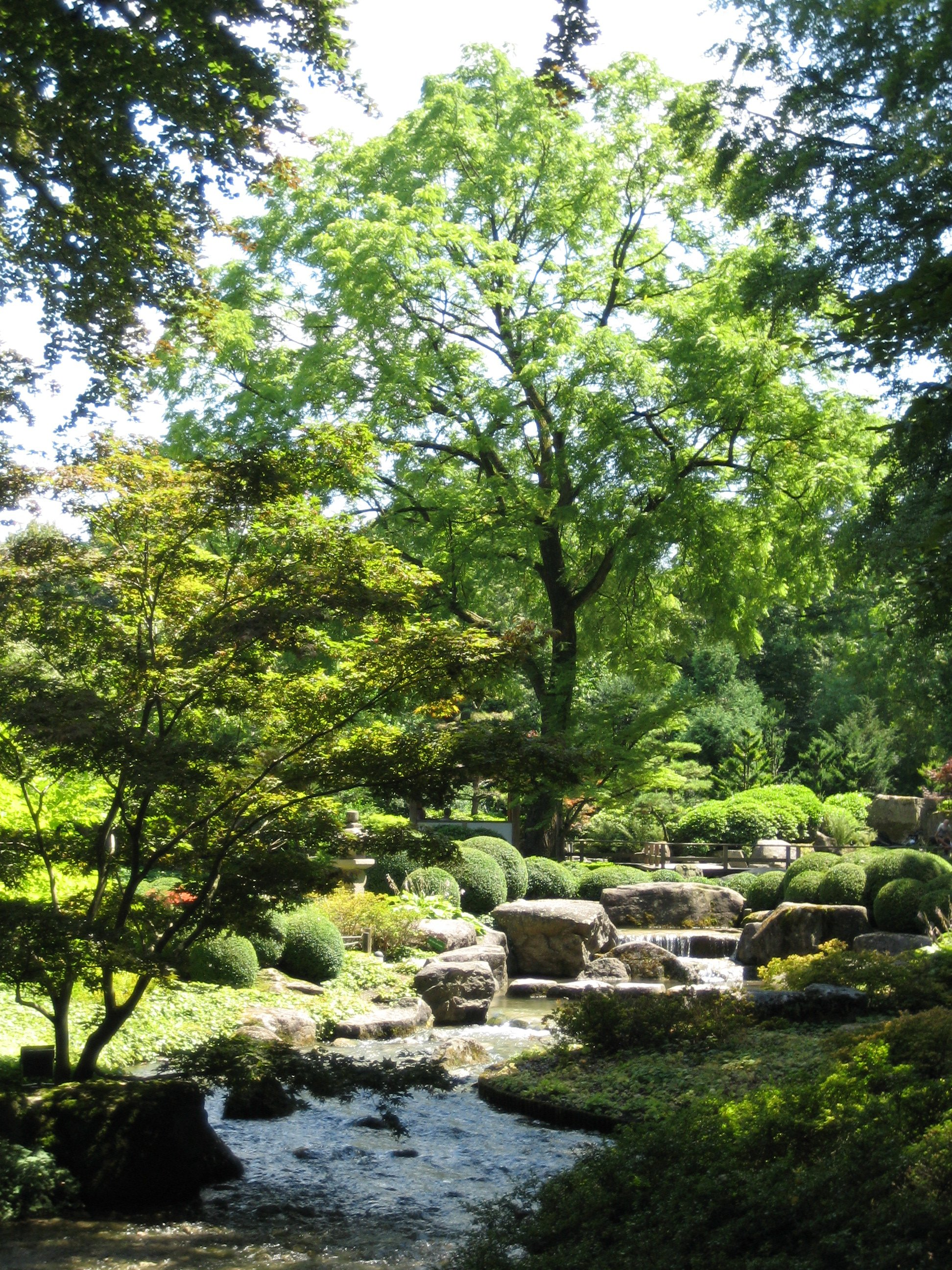 Botanischer Garten in Augsburg, der Wasserlauf im Japangarten